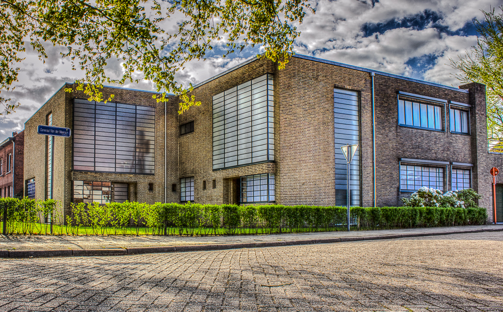 Tegenwoordig de uitvalsbasis van Architects in Motion, AIM.